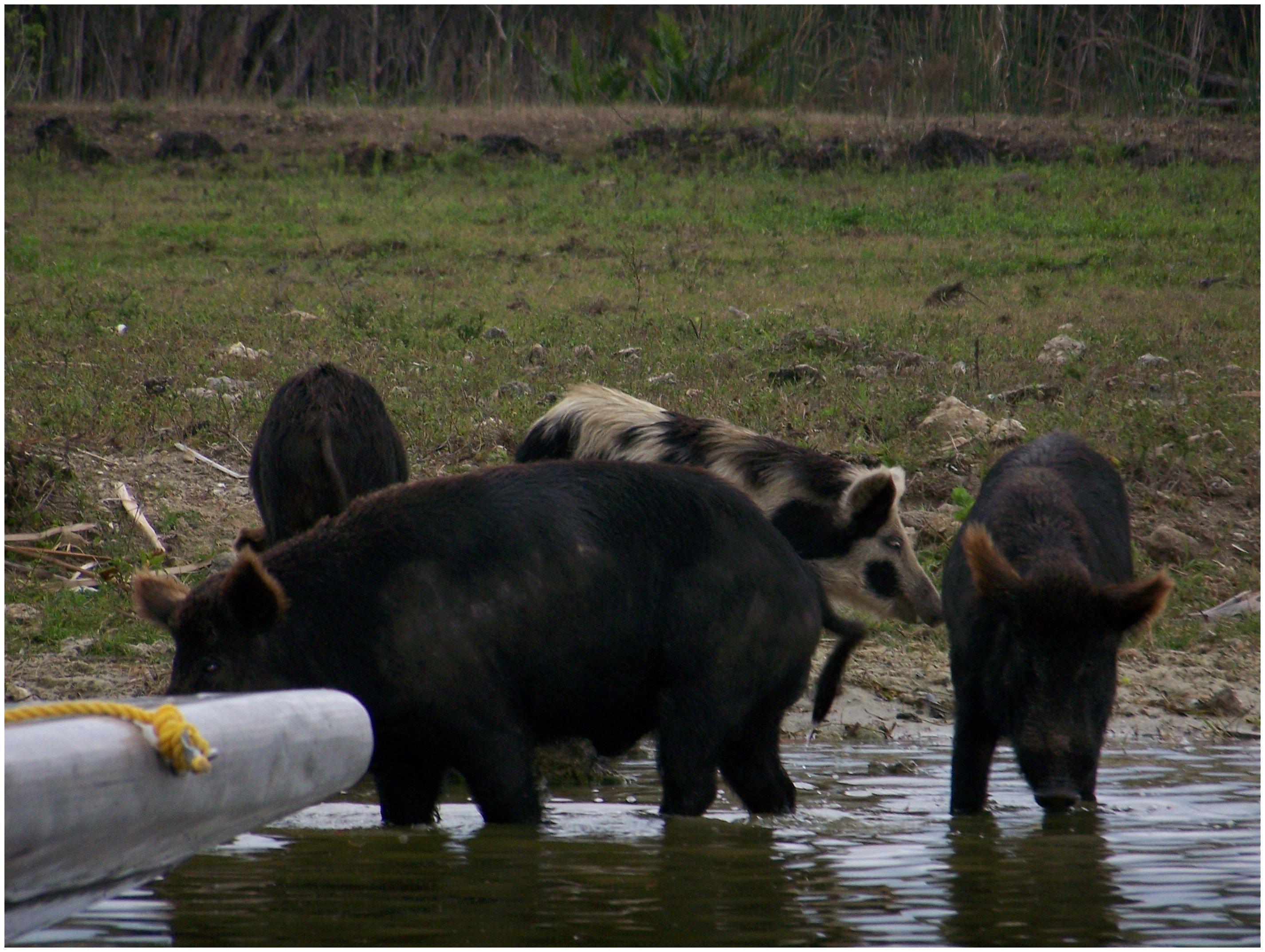 Wild Pigs, Everglades, FL, USA